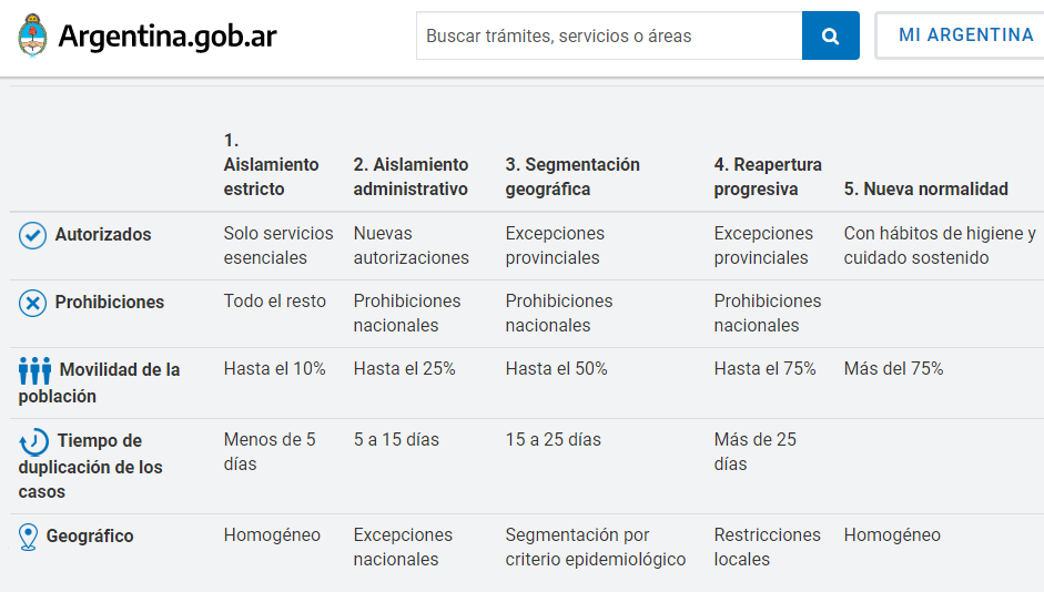 Gráfico del gobierno de Argentina. Las cinco fases de aislamiento/distanciamiernto para combatir el Covid-19